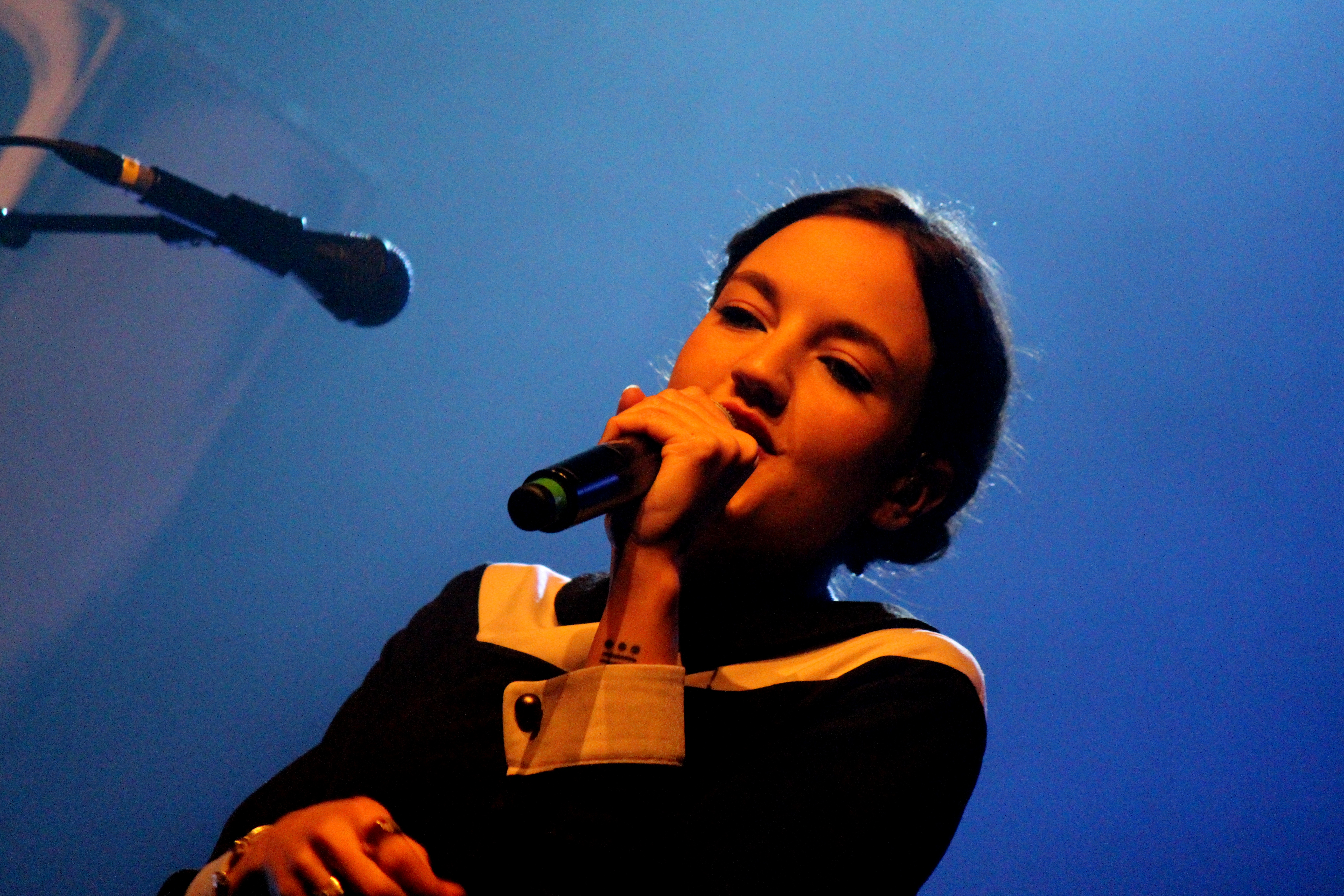 Jain aux Rendez-Vous Soniques 2015